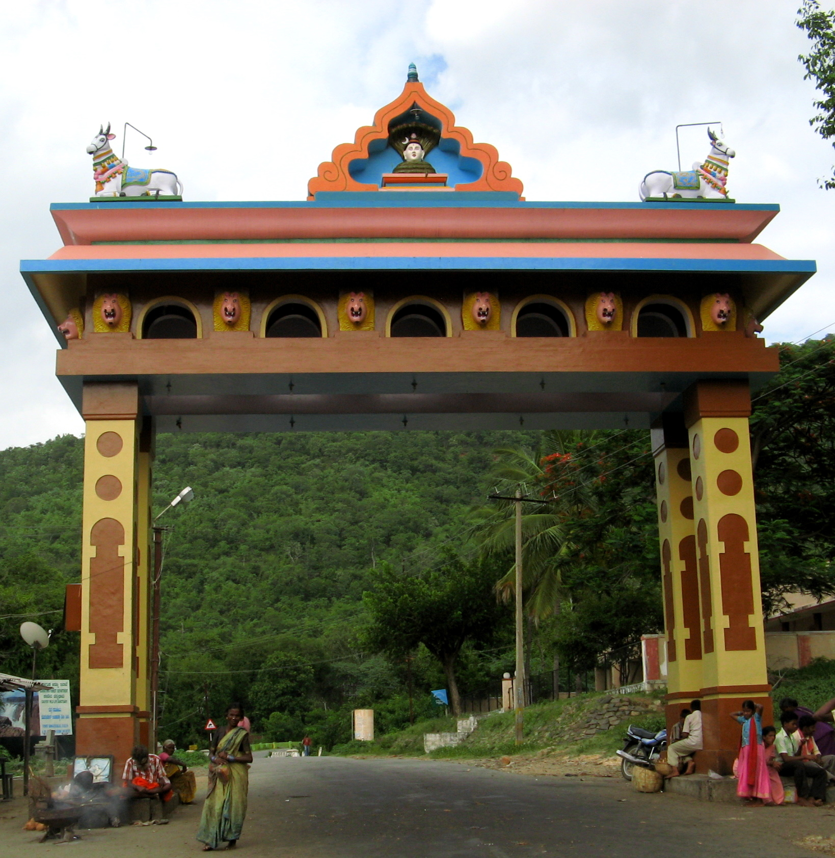 ಕನ್ನಡ: ಶ್ರೀ ಮಲೆ ಮಹದೇಶ್ವರ ಬೆಟ್ಟ - ತಾಳಬೆಟ್ಟ